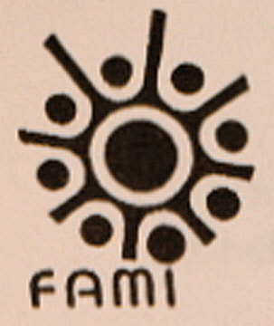 Fotografía del logotipo de la Federación